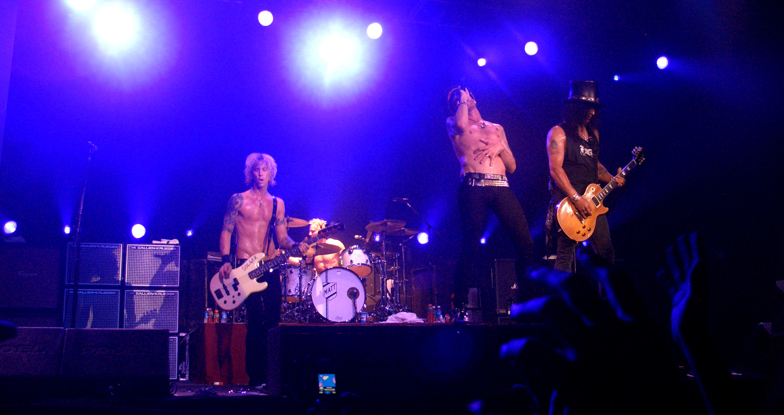 "....Fallliiiiinnngggg dooooowwwnnnn....."